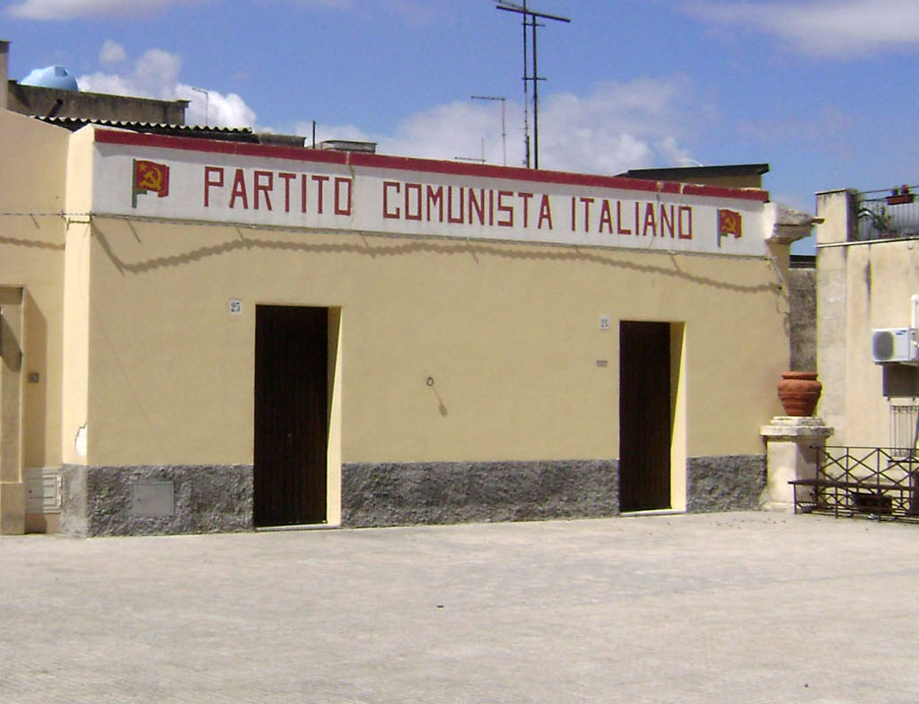 Mineo: Storica sezione del Partito Comunista Italiano